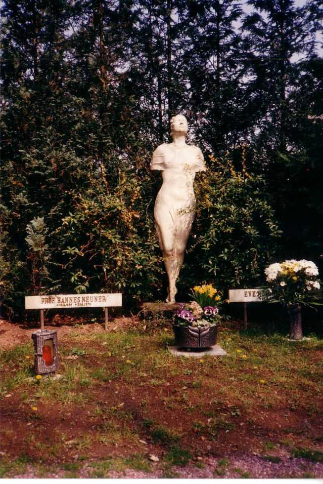 Waldfriedhof Aschaffenburg Grabmal Professor Hannes Neuner * 27. August 1906 in Schweinheim † 25. April 1978 in Stuttgart